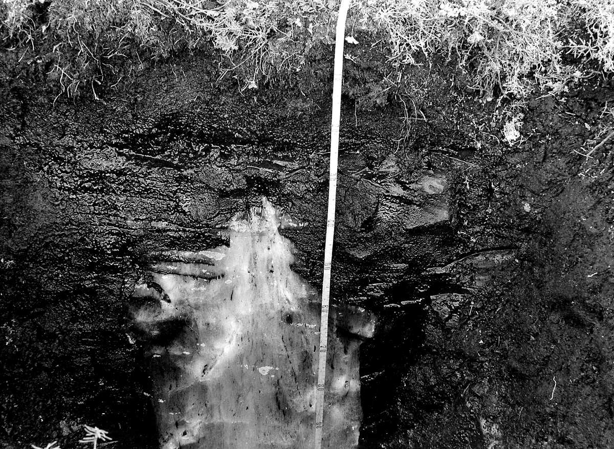 Glacia vejno en torfejo. Duoninsulo Gidano. 1987